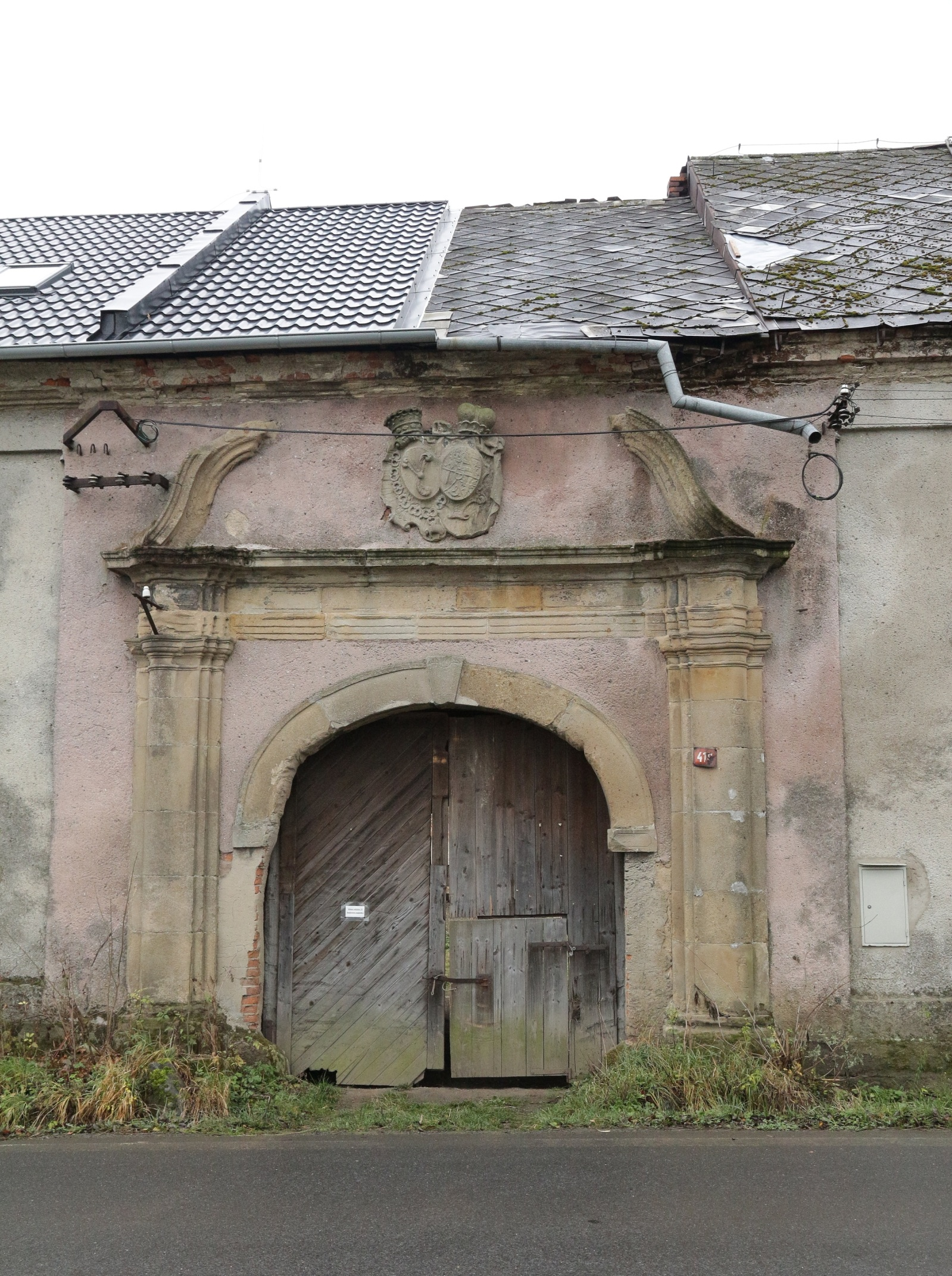 Vstupní portál Horního dvora v Suchdole nad Odrou; nad portálem je alianční znak hrabat z Harrachu a knížat z Liechtensteinu